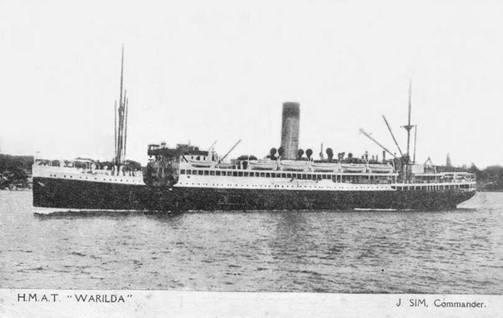 HMAT Warilda